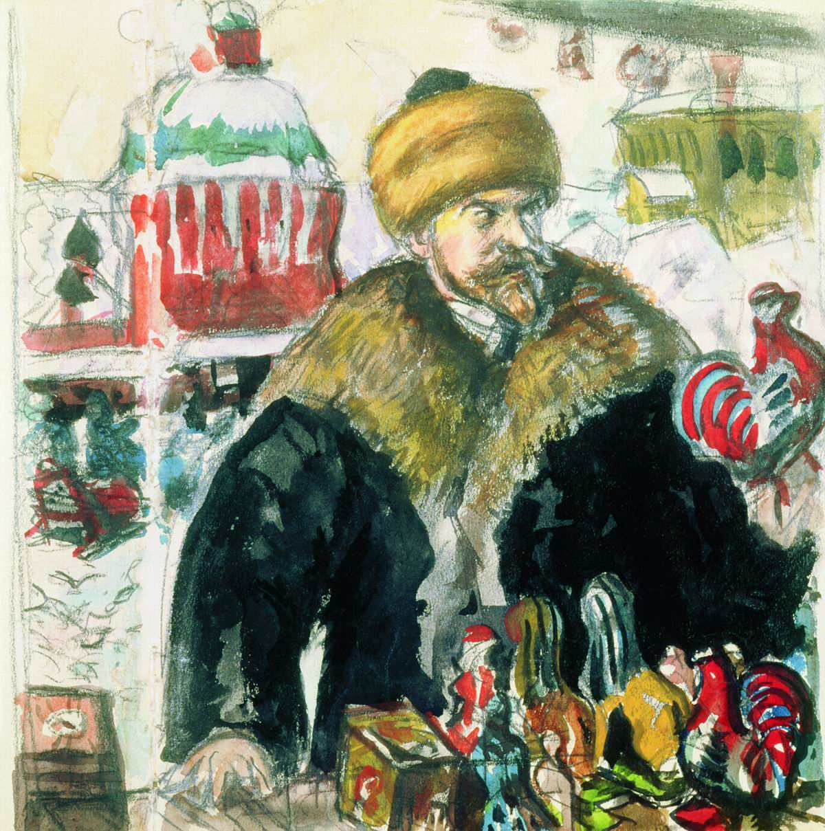 Эскиз